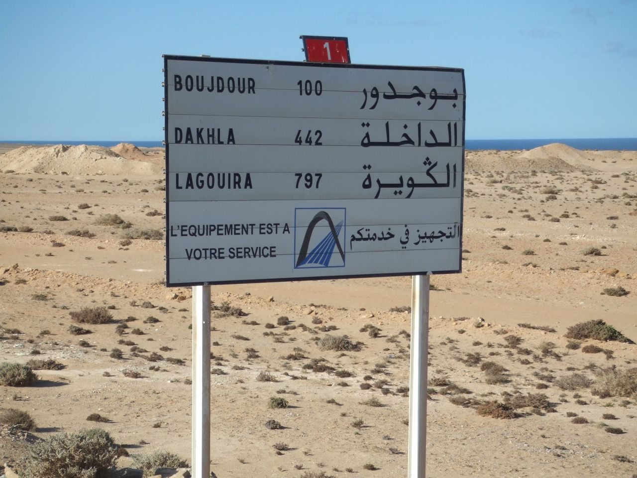 Señal de tráfico en la N1 indicando las distancias a El Aaiun, Dajla y La Agüera (Sahara Occidental)